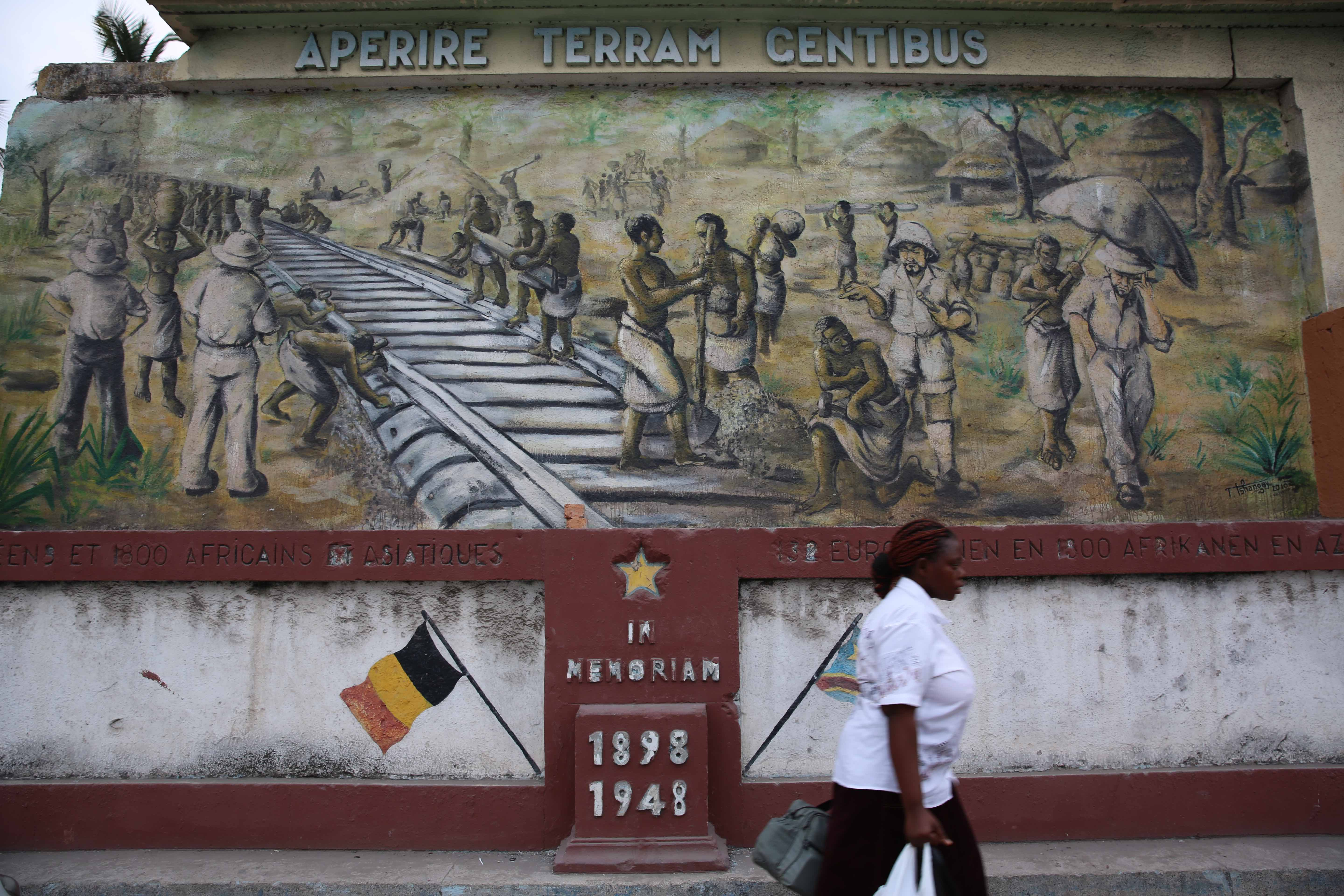 Photo MONUSCO / Abel Kavanagh